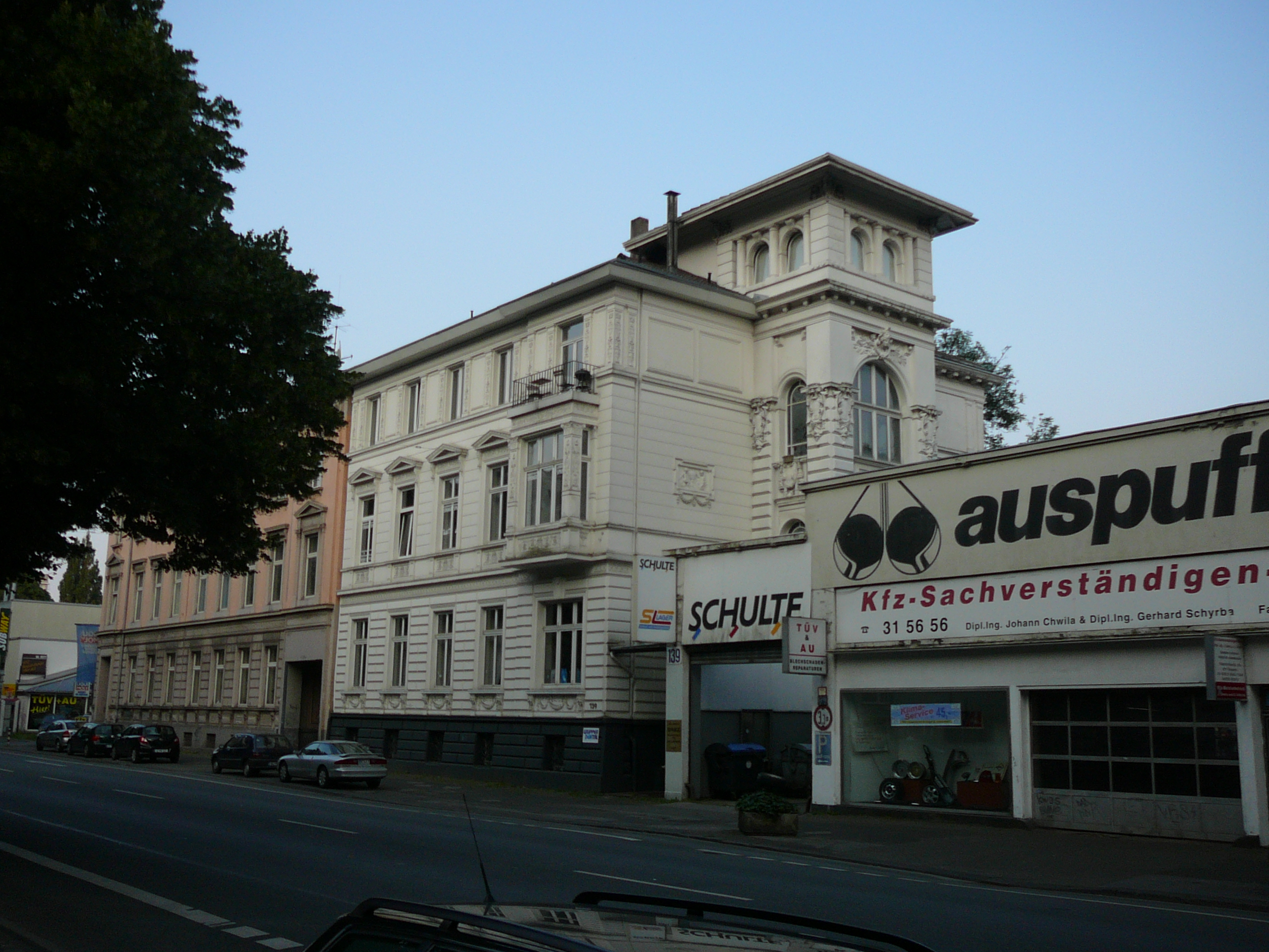 Friedrich-Ebert-Str., Wuppertal